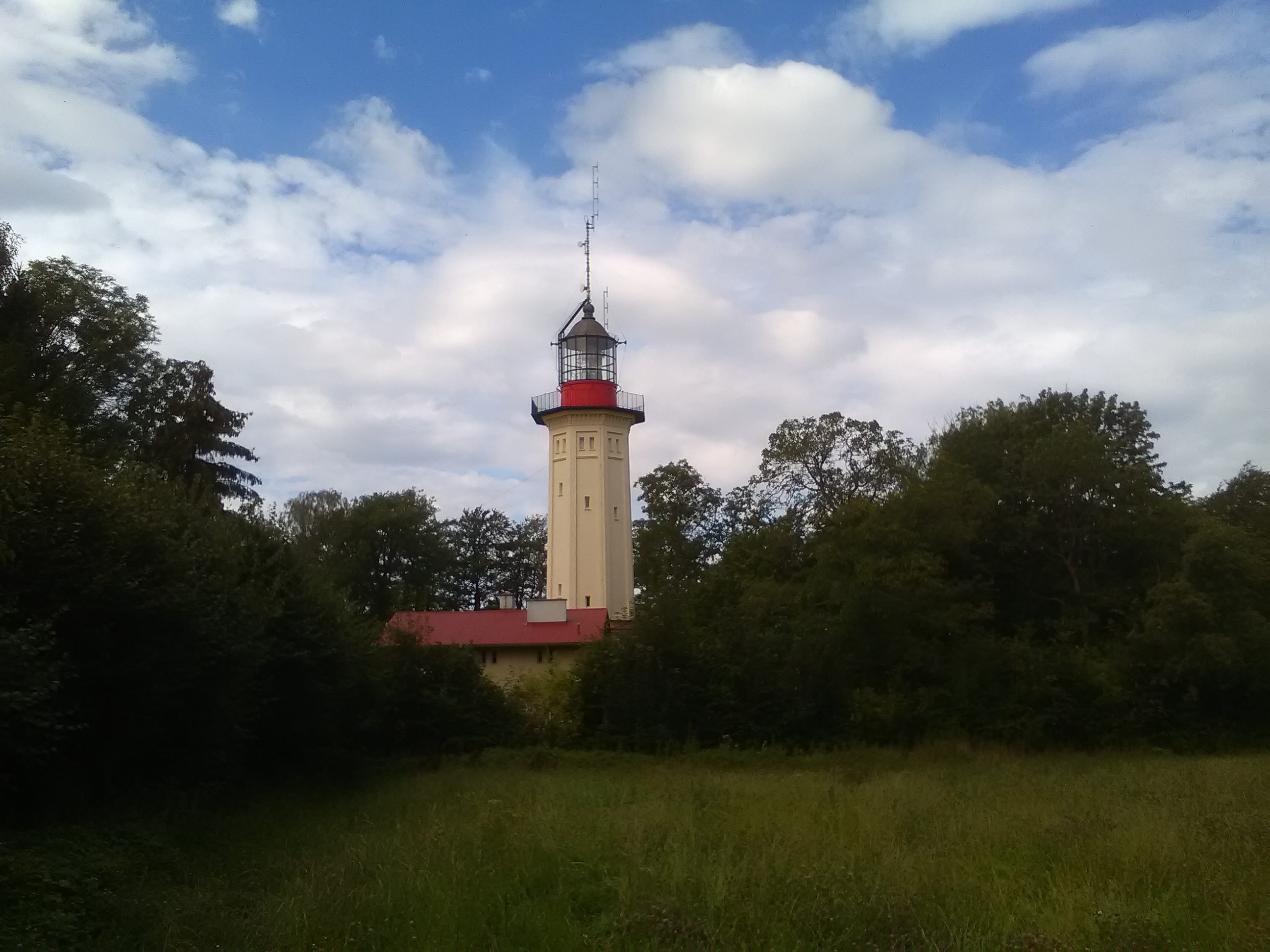 Latarnia morska Rozewie